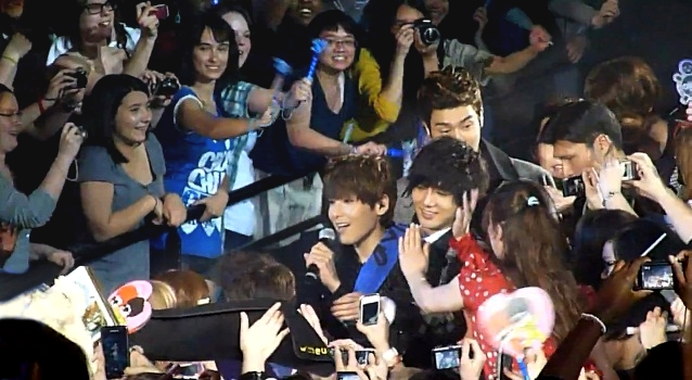 Super junior meeting fans in Paris